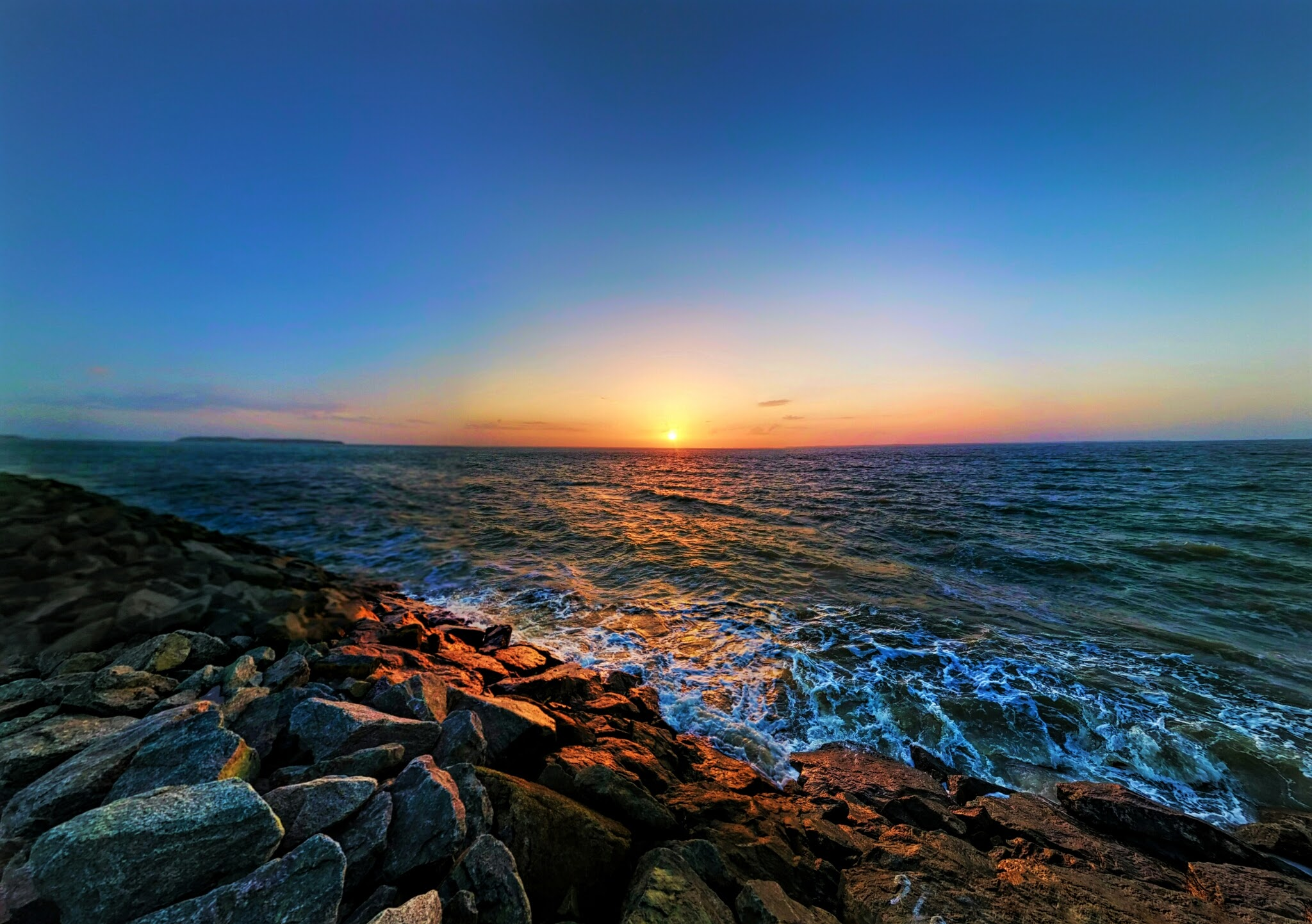 Foto tirada nas pedras do espigão costeiro de São Luís-MA/Brasil com LG G3 e edição feita com Snapseed